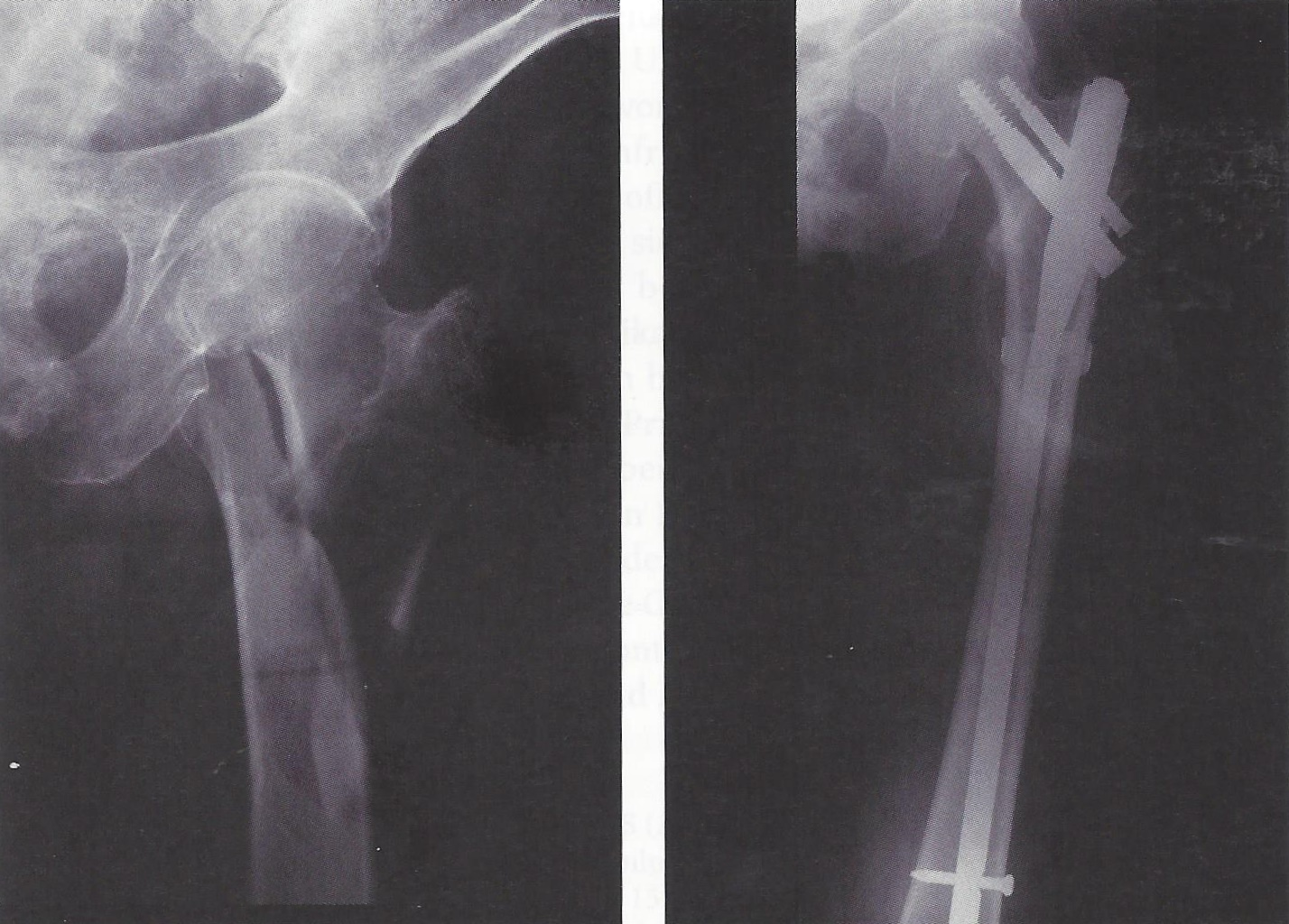 Lange subtrochantere (reversed) Femurfraktur bei 99-jähriger Patientin. Vor der Einbringung des proximalen Femurnagels wurde die Fraktur offen reponiert und mit einer Cerclage zusammengezogen. Die alte Dame starb noch im Krankenhaus.